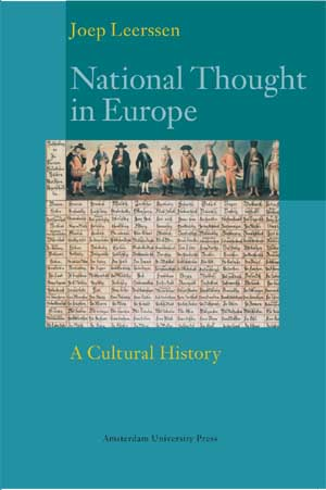 Kaft van boek van auteur Joep Leerssen